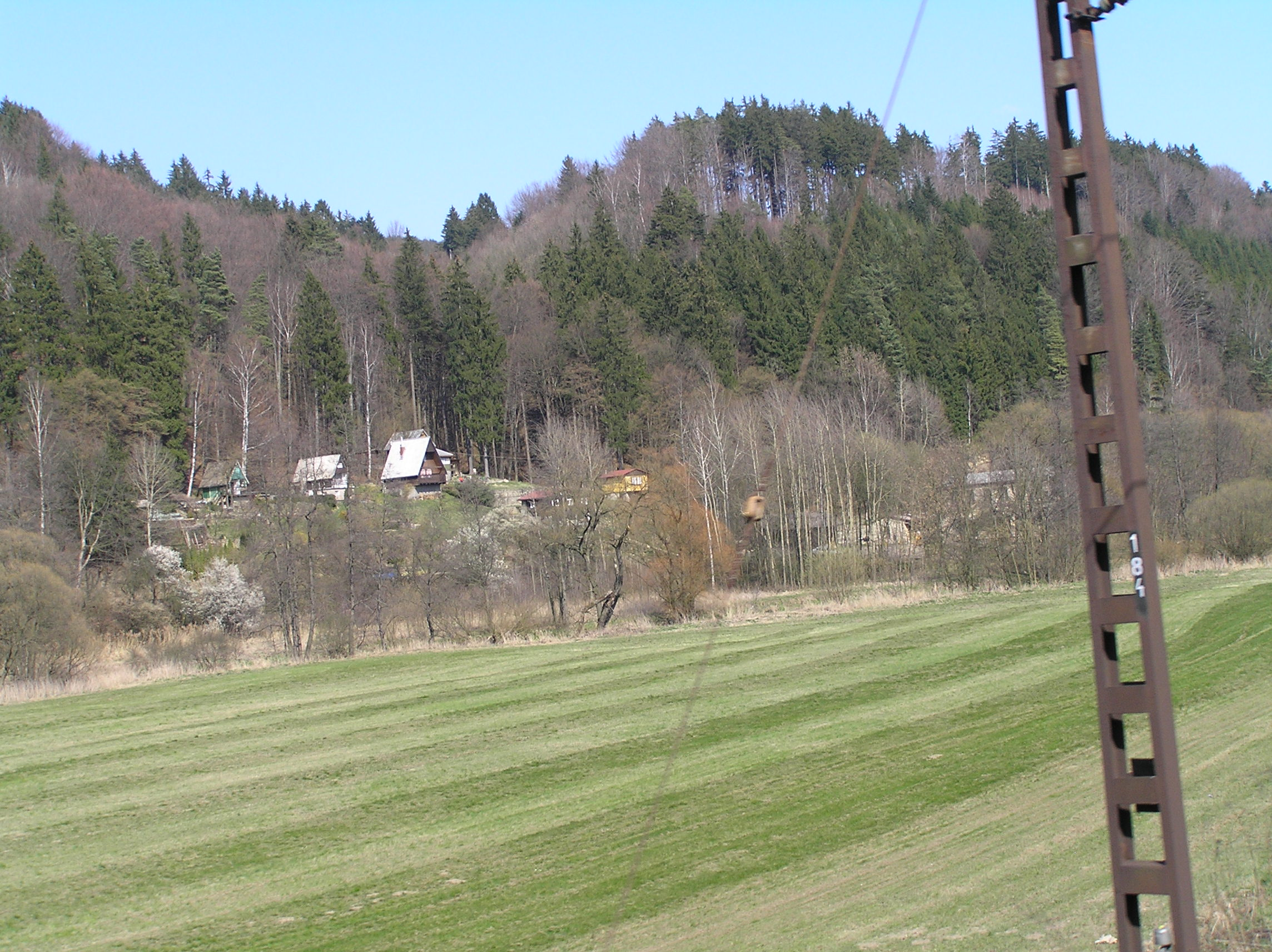 the settlement Bezpráví, Czech Republic